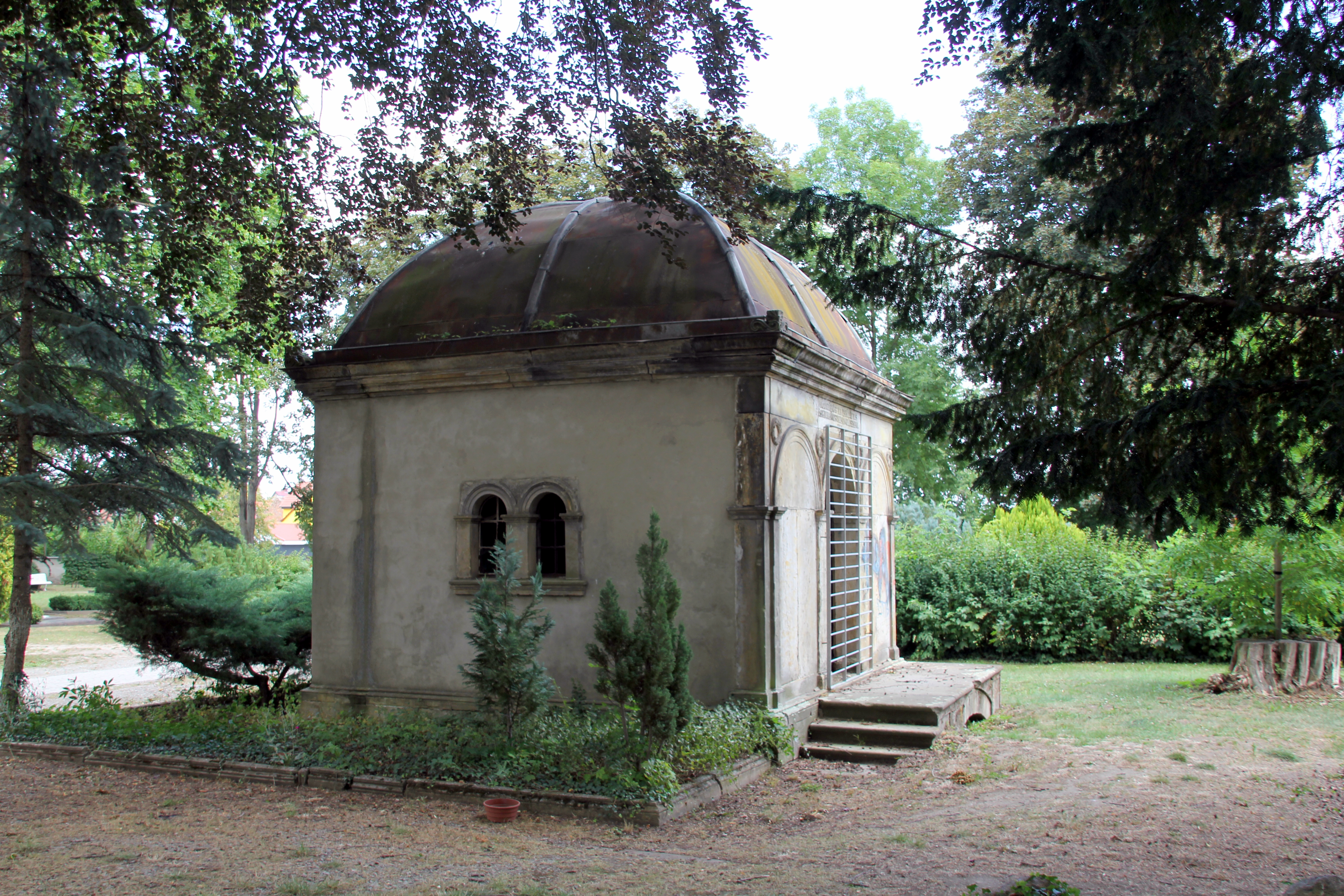 Mausoleum auf dem Friedhof Walter-Rathenau-Straße in Niederndodeleben